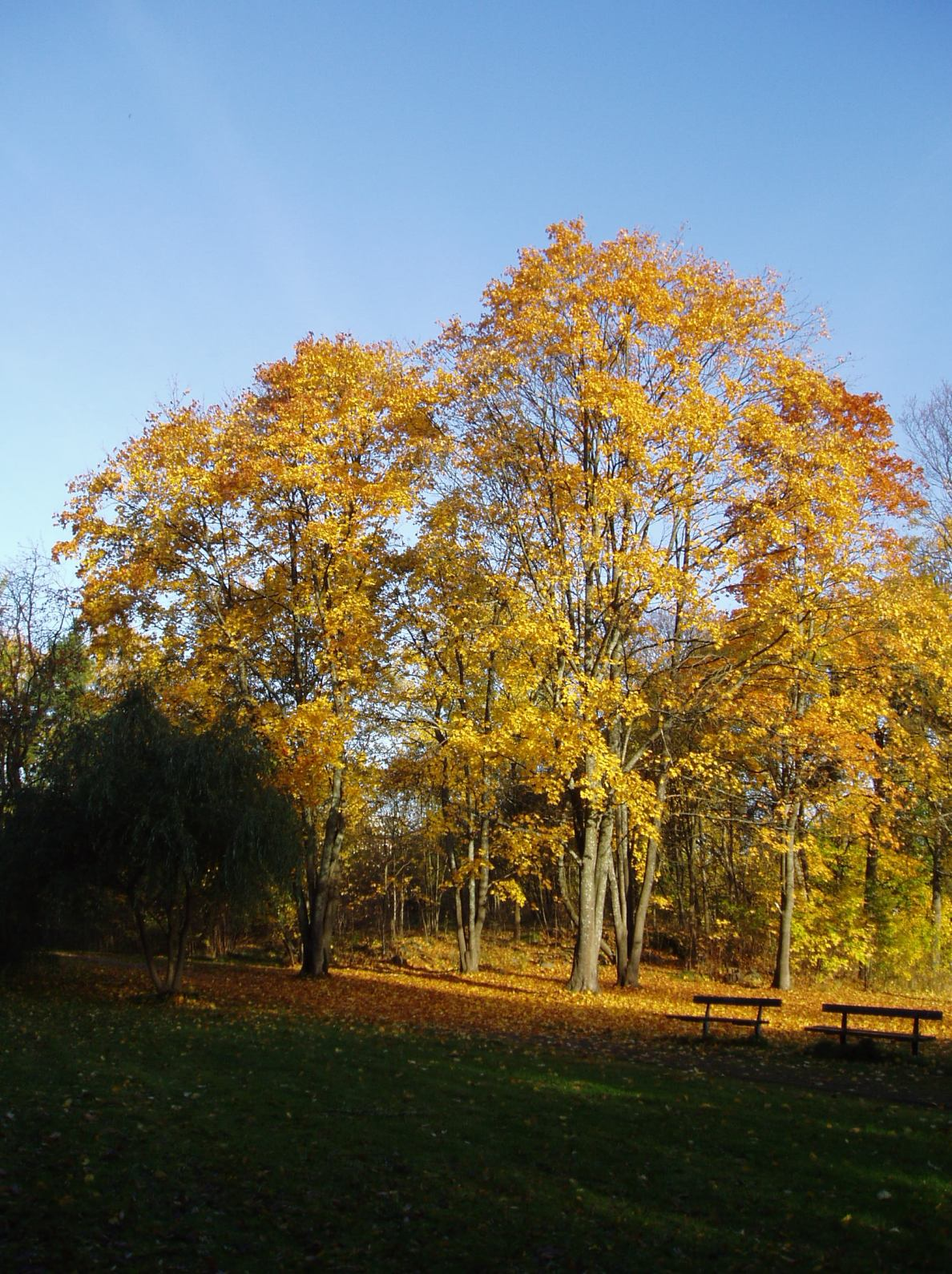 Lindeparken, Enskede gård, Stockholm